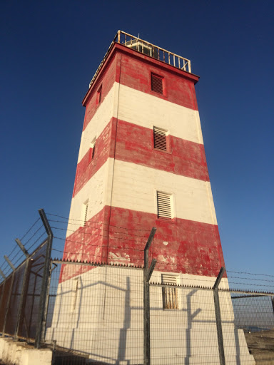 Faro de Punta Caldera